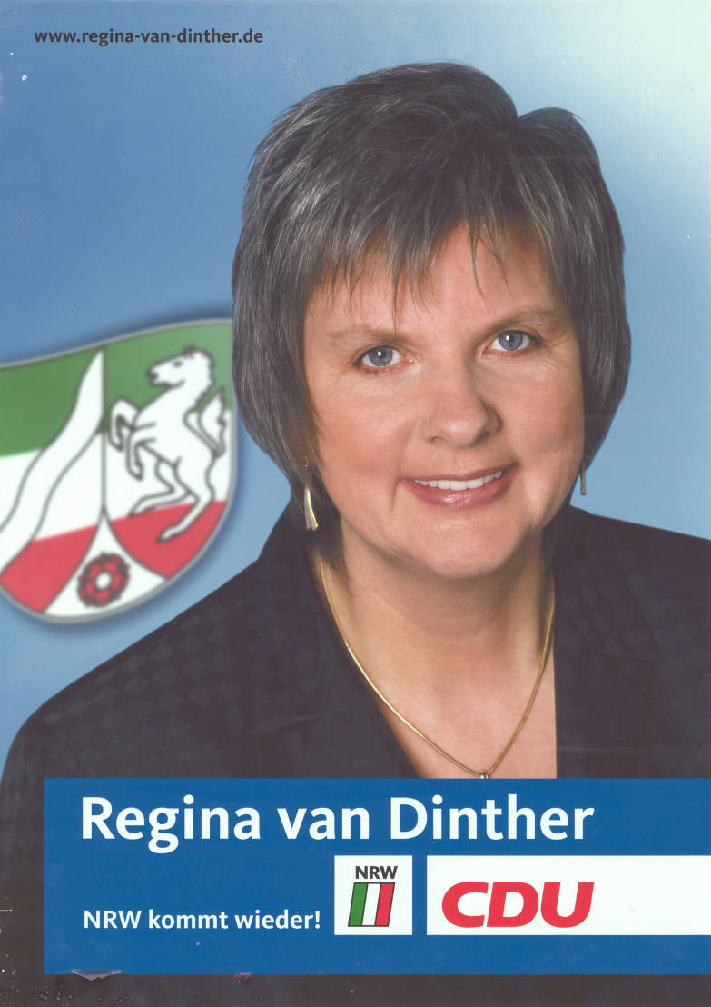 Regina van Dinther NRW kommt wieder! NRW CDUAbbildung:Porträtfoto - LandeswappenKommentar:Rückseitig Druckgenehmigung; Stempel und Farbflecke.Plakatart:Kandidaten-/Personenplakat mit PorträtObjekt-Signatur:10-009 : 2021Bestand:Landtagswahlplakate Nordrhein-Westfalen (10-009)GliederungBestand10-18:Landtagswahlplakate Nordrhein-Westfalen (10-009) » CDULizenz:KAS/ACDP 10-009 : 2021 CC-BY-SA 3.0 DE